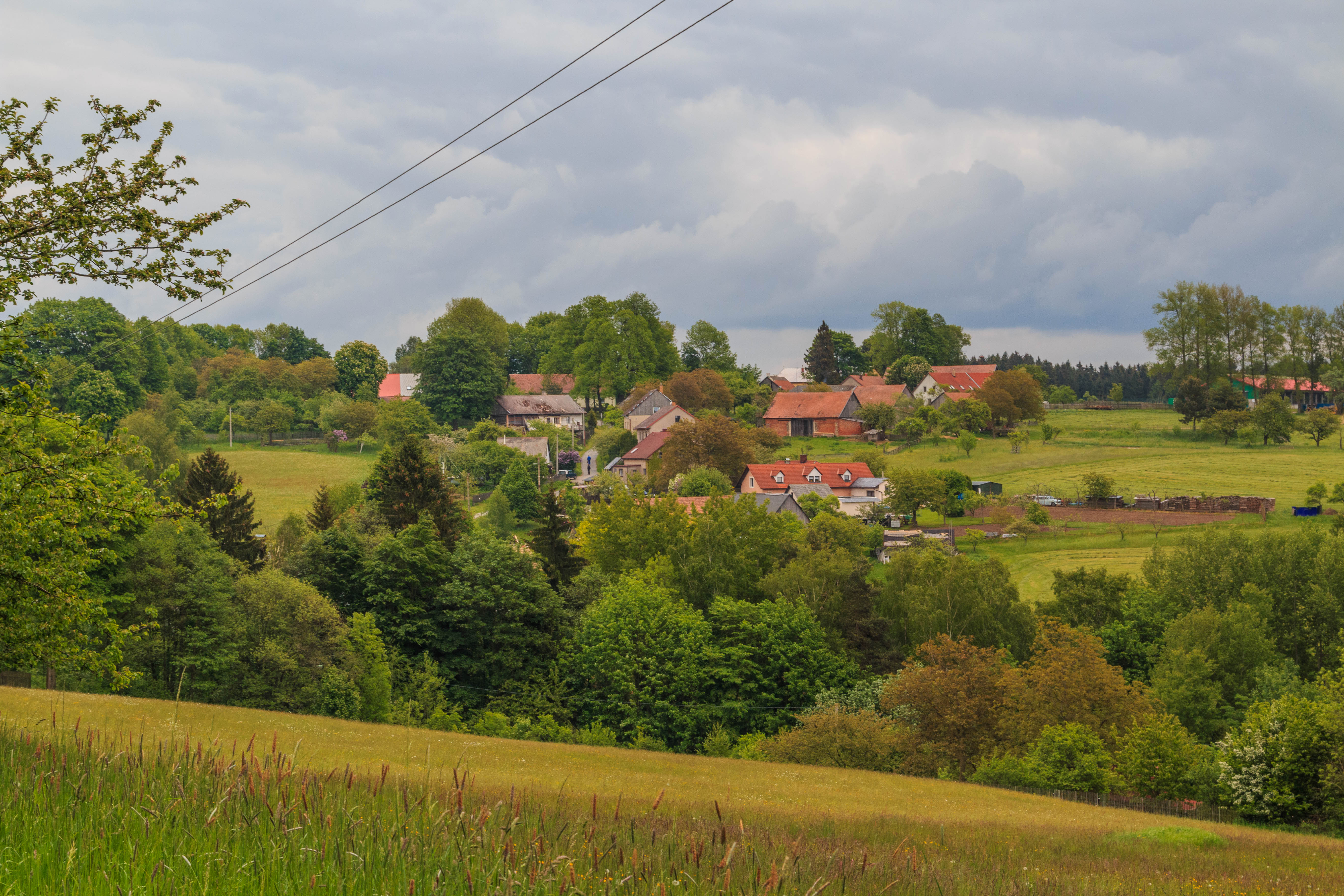 Chloumek u Libice nad Doubravou - pohled od Spálavy